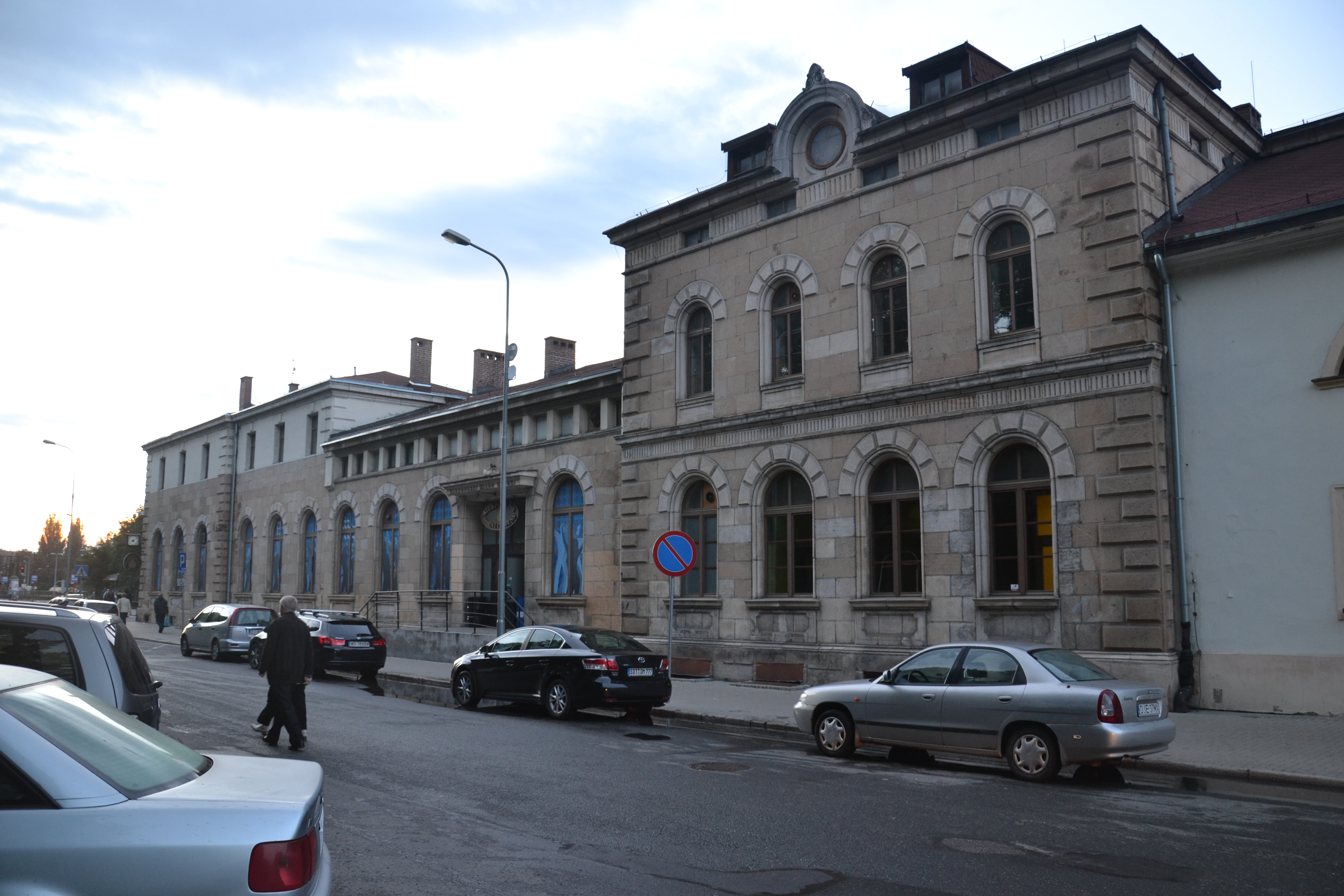 Widok na skrzydło zachodnie dworca kolejowego w Jeleniej Górze